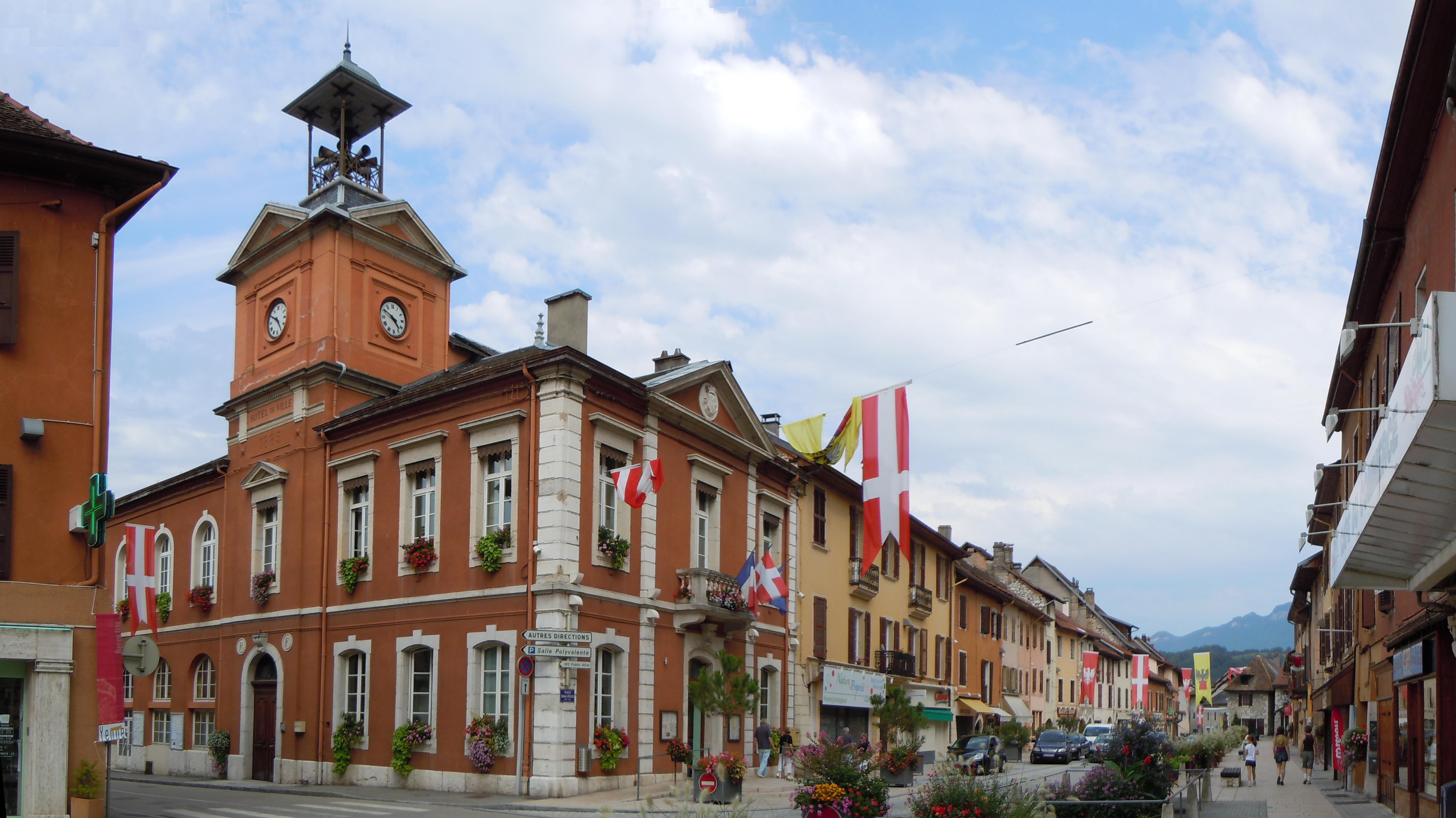 Yenne Place - Charles Dullin - Savoie - France. À gauche, l'hôtel de ville.